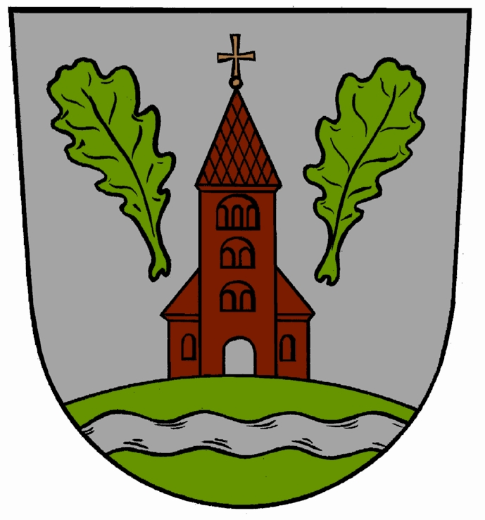 Das Wappen ist redend und bezieht sich in allen Symbolen auf die 1968 zusammengeschlossene Gemeinde Grasberg, für die der grüne Berg und der Turm der Grasberger Kirche symbolisierend reden. Die Wellenleiste, bezugnehmend auf die Wörpe, symbolisiert die bisherige Gemeinde Wörpedorf. Die Eichenblätter nehmen Bezug auf die ehemalige Gemeinde